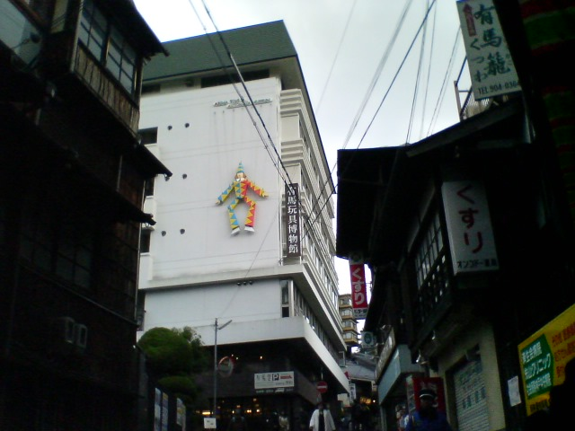 Arima Toys & Automata Museum (Arima=Gangu-Hakubutsukan, 有馬玩具博物館), Kobe City, Hyogo Pref., Japan